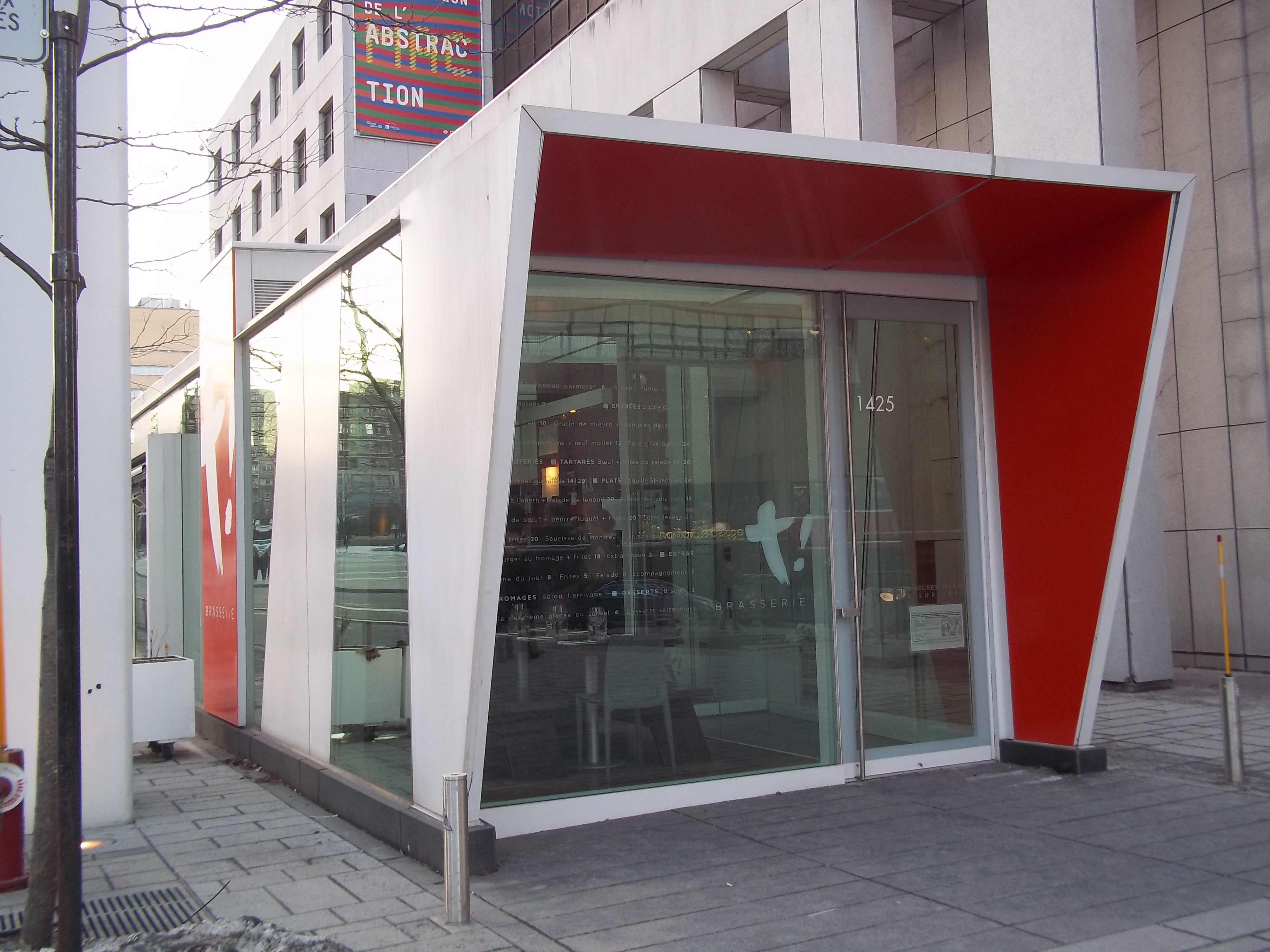 1425, rue Jeanne-Mance, Montréal Brasserie T!